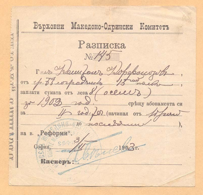 Разписка на ВМОК от 1903 година